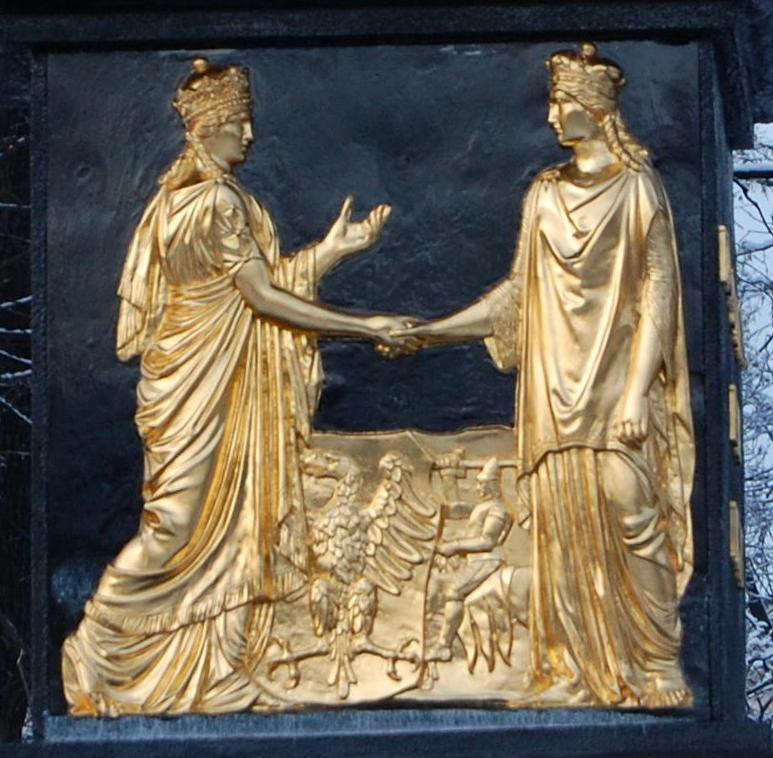 Płaskorzeźba na pomniku Unii Lubelskiej w Lublinie przedstawiająca Koronę i Litwę.